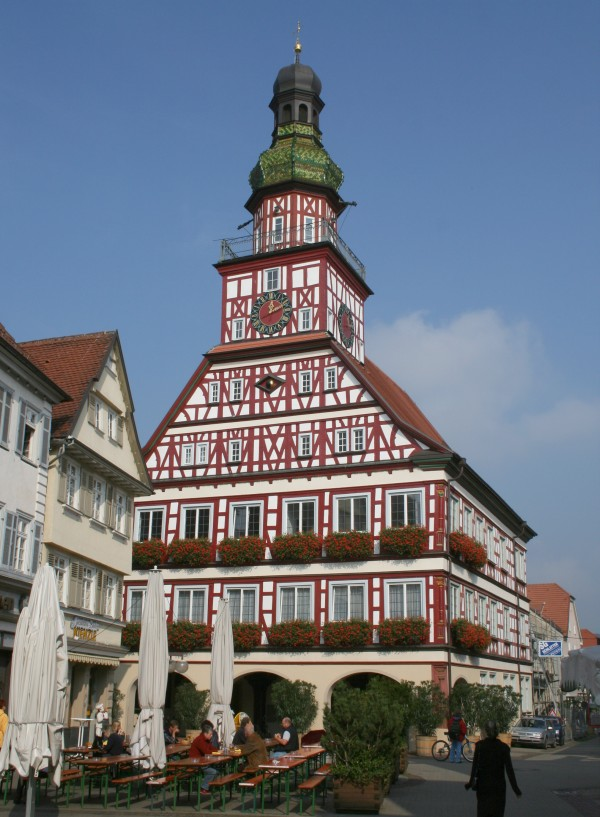 Rathaus Kirchheim unter Teck Fotografiert: Oktober 2005